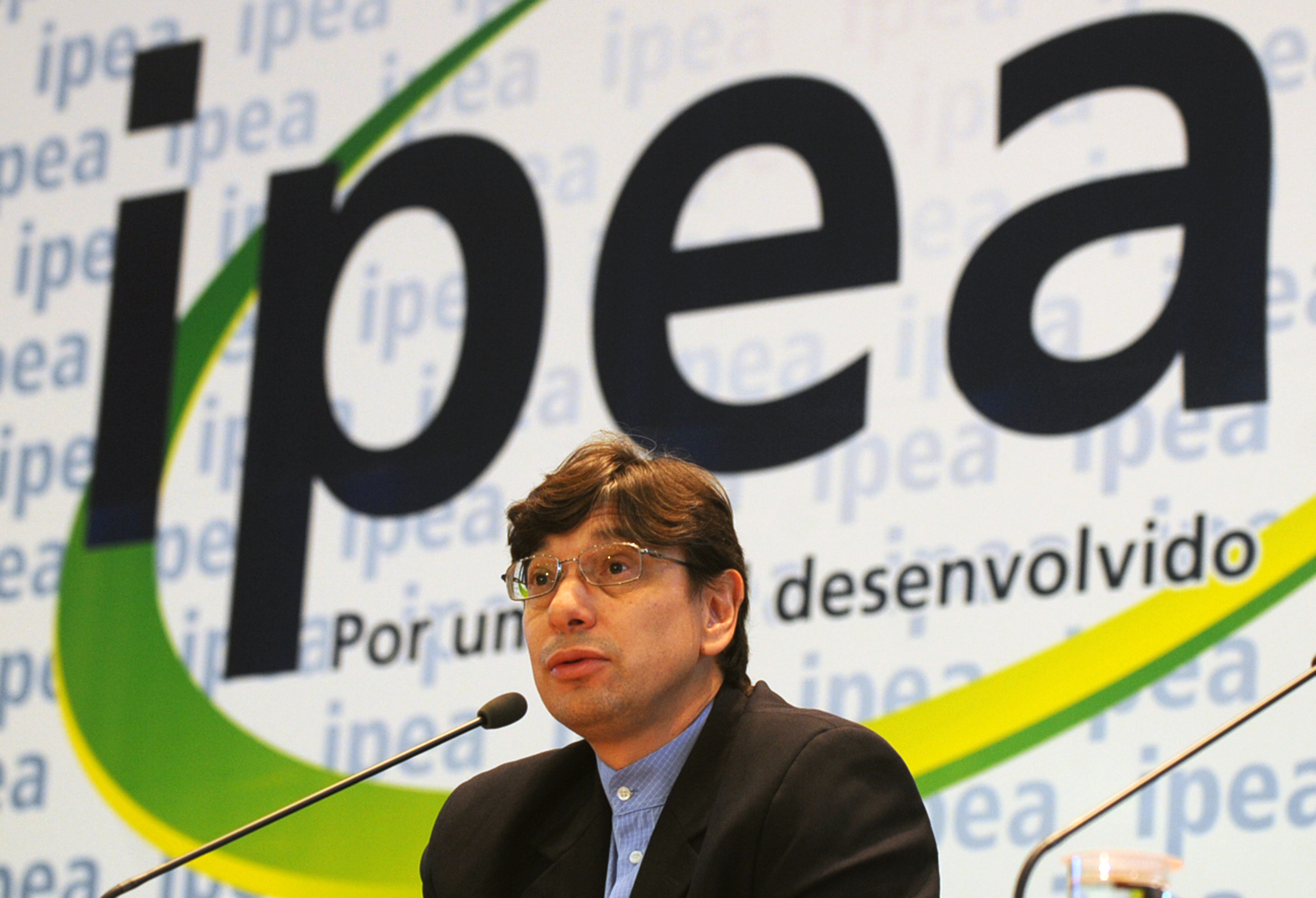 Brasília - O presidente do Ipea, Marcio Pochmann abre o seminário Taxação sobre fluxos financeiros para um mundo melhor.